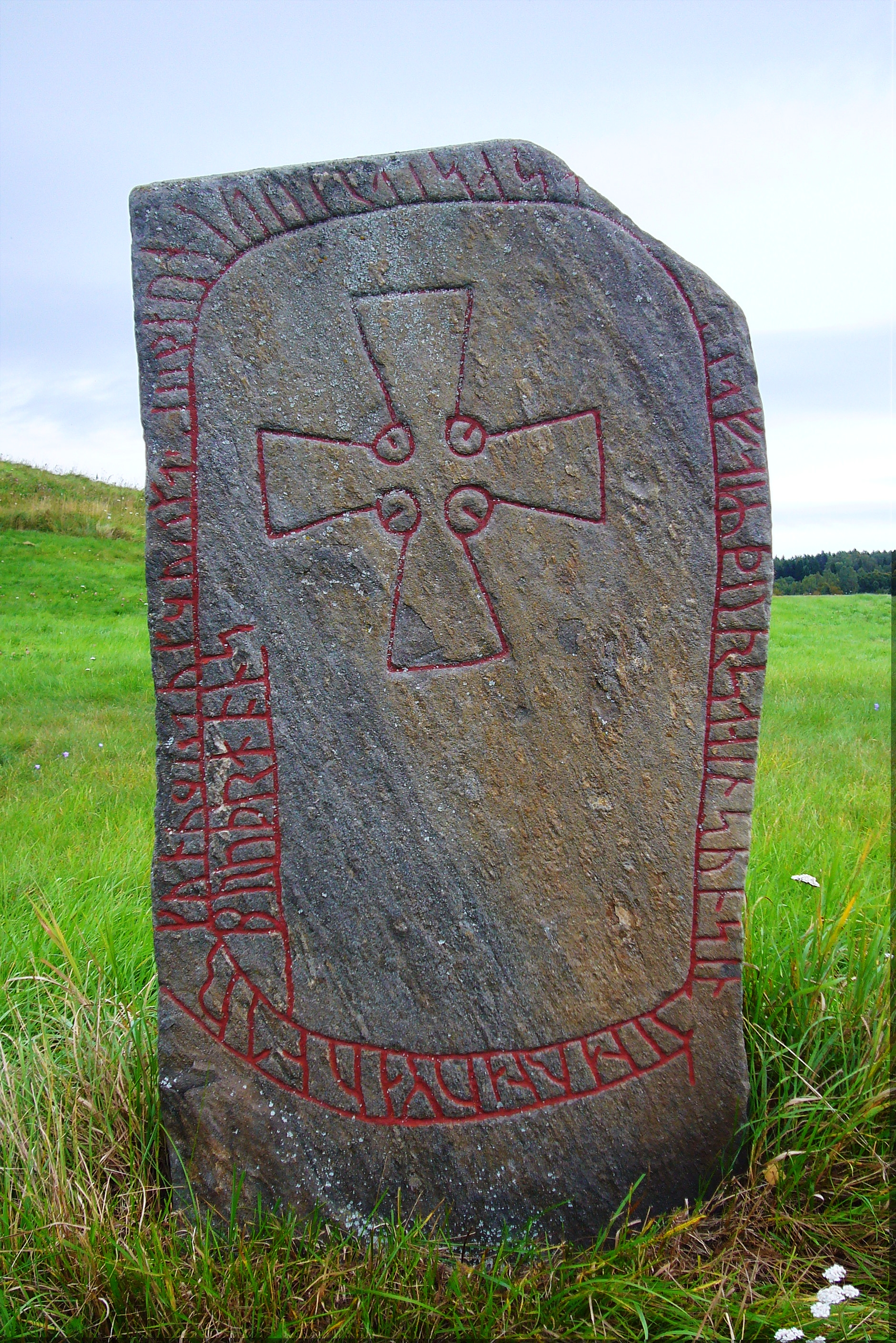 Högomstenen (M 11) i mulet ljus